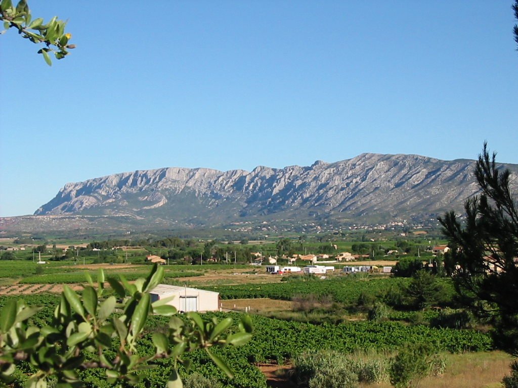 Vue prise depuis les moulins Saint-Pierre à Pourrières dans le Var